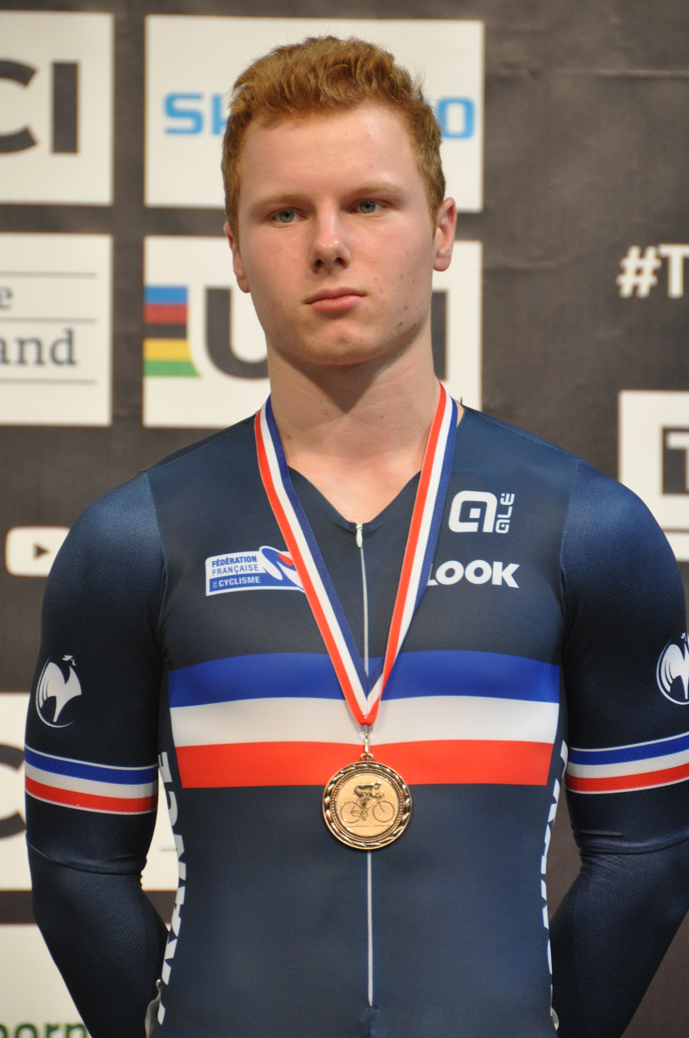 Sebastien Vigier, französischer Radsportler, Silber im Teamsprint